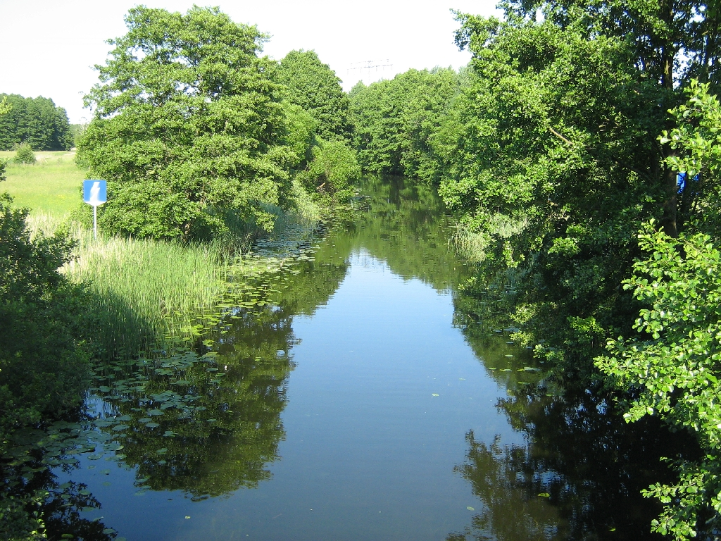 die Havel bei Klein Quassow in der Mecklenburgische Seenplatte (Landkreis Mecklenburg-Strelitz, Mecklenburg-Vorpommern, Germany).